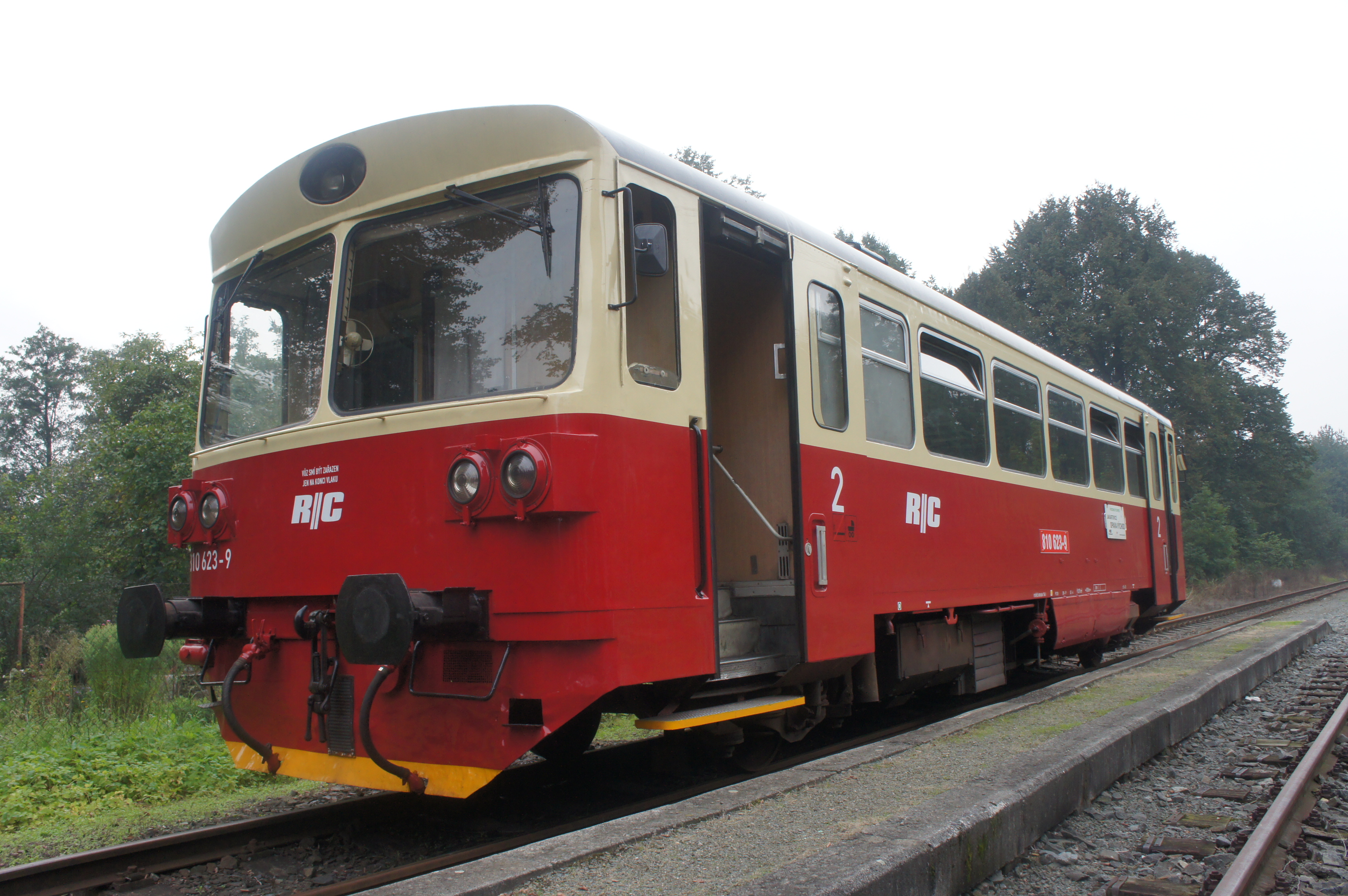 Již mnohokrát se na hvozdnickém expresu objevila 810.623-9. Později se také střídala s810.405-1